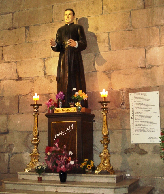 Imagen de San Alberto Hurtado en la Catedral Metropolitana de Santiago de Chile.